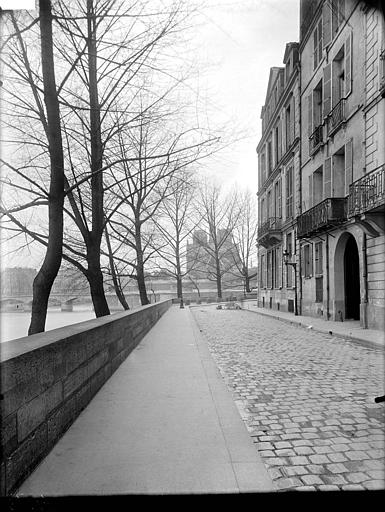 Vue du quai